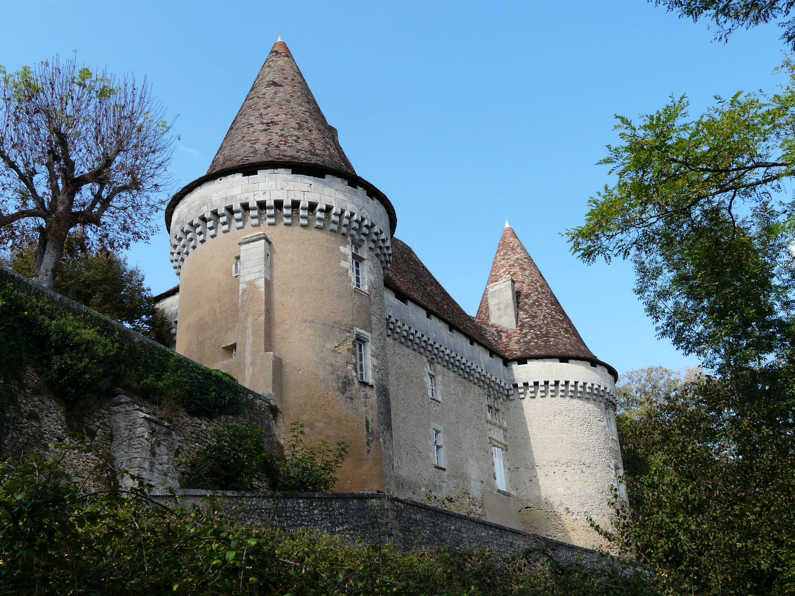 Le château de Mauriac vu depuis le sud-est, Douzillac, Dordogne, France Object location45° 05′ 20.2″ N, 0° 25′ 56.1″ E